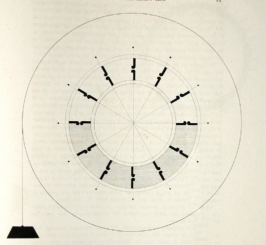 Schéma d'une horloge à mercure entrainée par un poids et pouvant actionner un astrolabe.